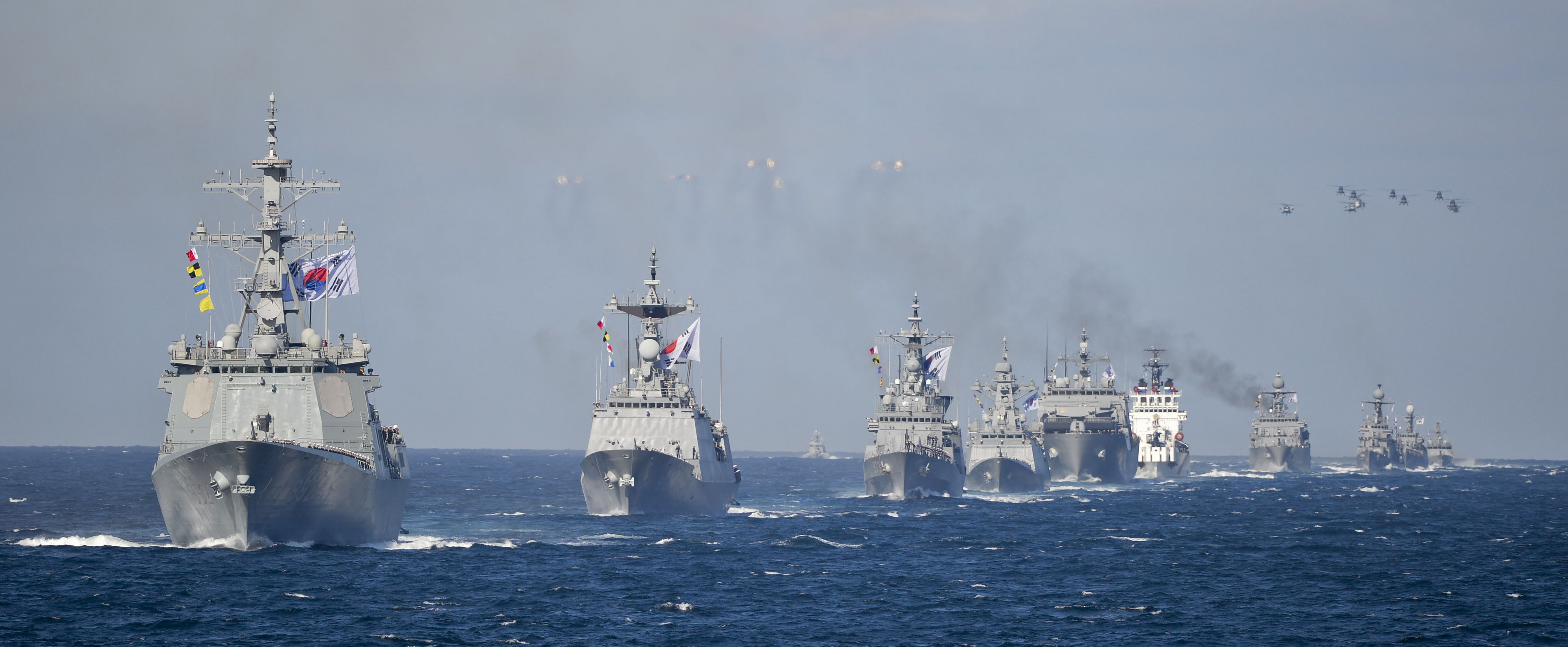 2015.10.17. 제 1차 국민참관 해상사열